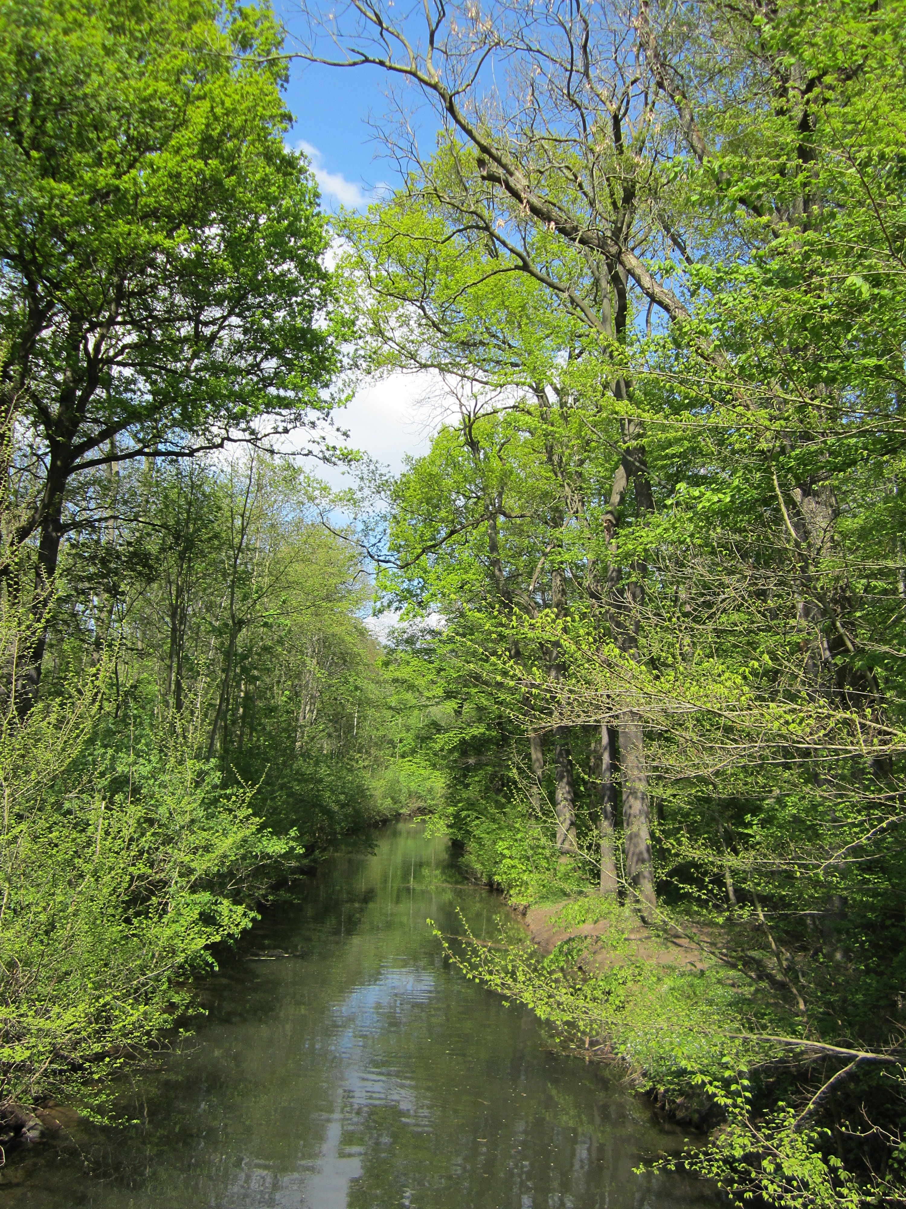 Blick von der "Weißen Brücke" auf die Batschke im Leipziger Auenwald (LSG l 10)